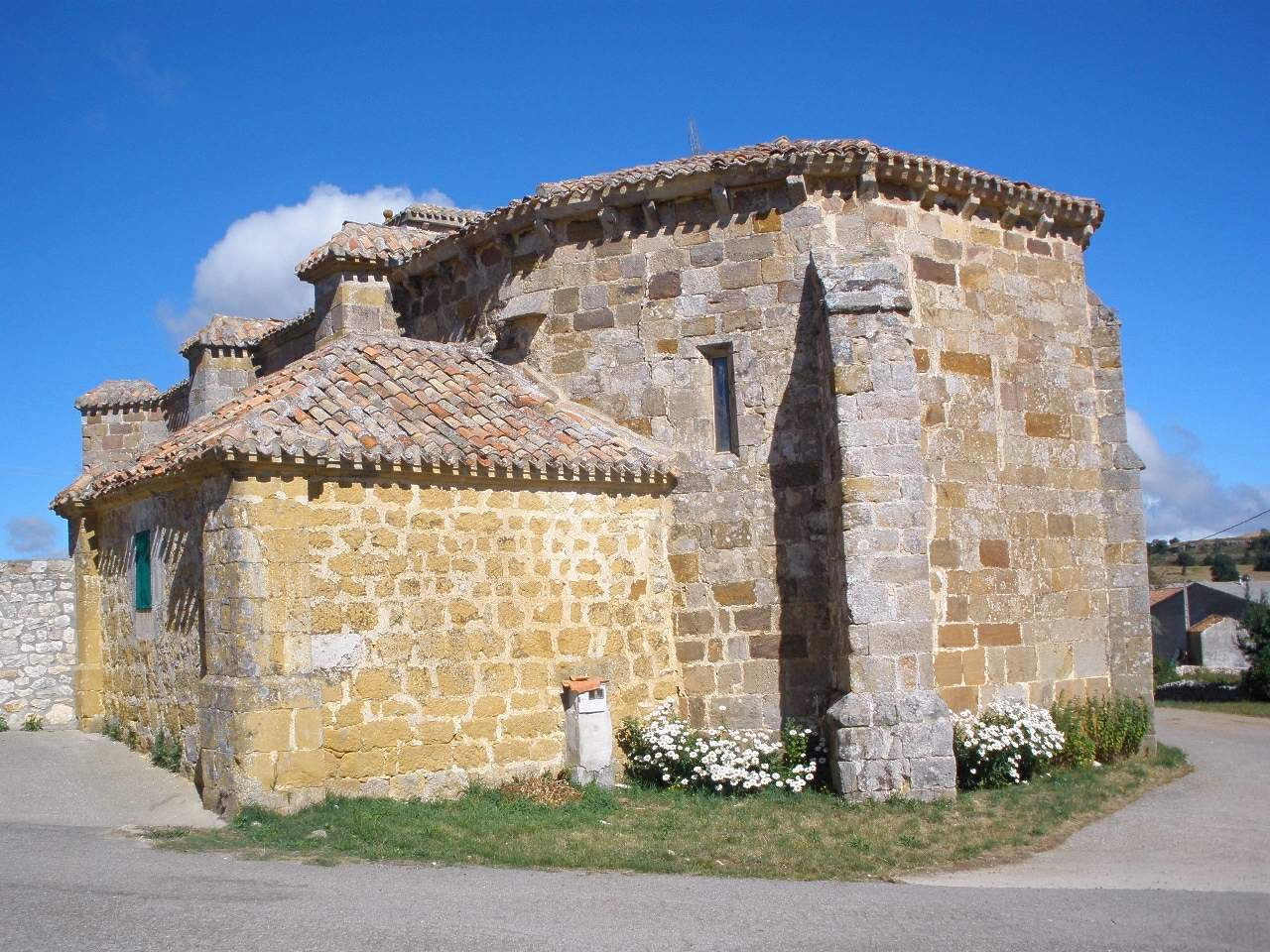 Trasahedo (Burgos) - Iglesia de Santa Marina